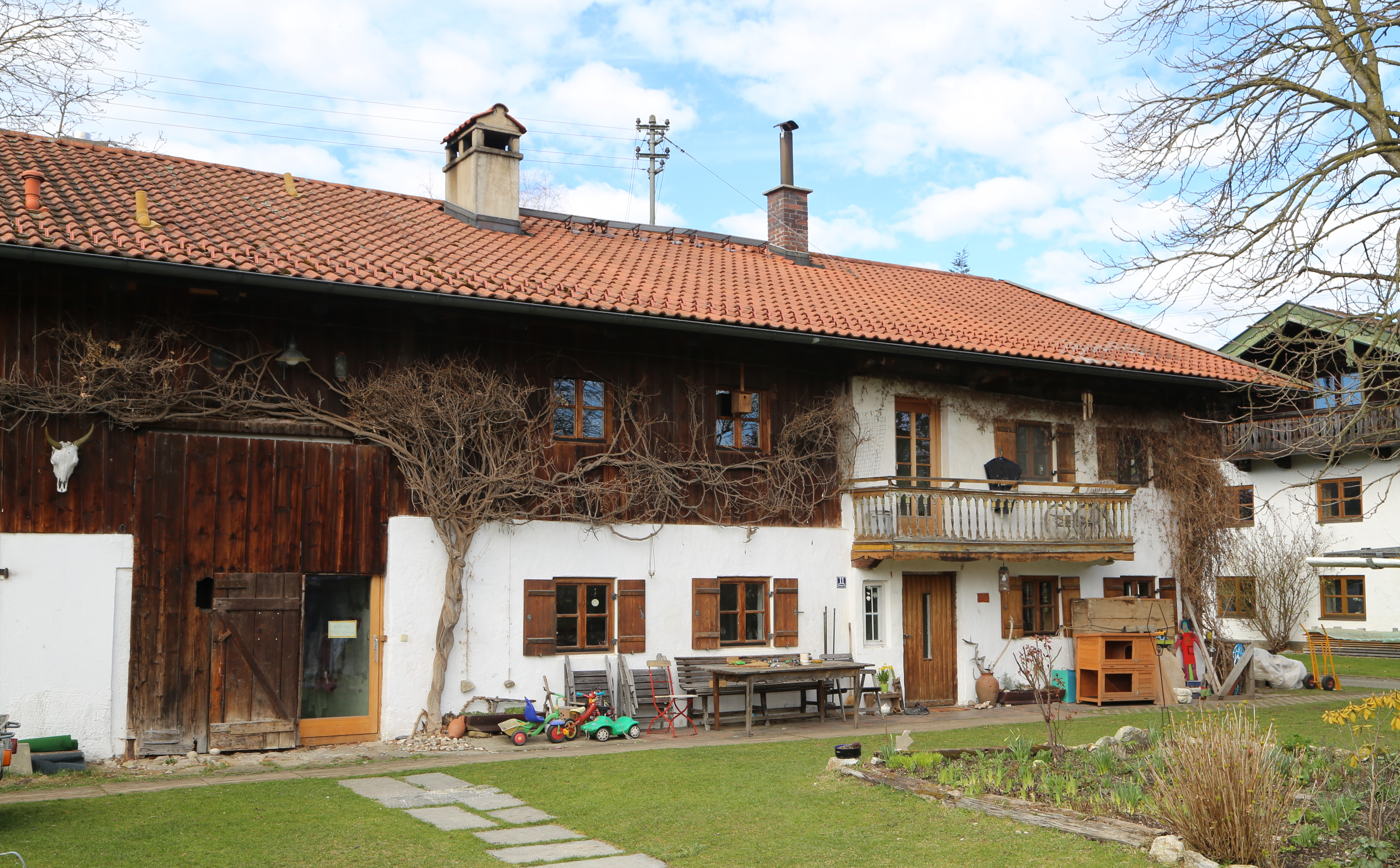 Thansauer Straße 11, Neuwöhr, Neubeuern; ehemaliges Bauernhaus, Einfirsthof, zweigeschossiger Flachsatteldachbau mit traufseitiger Laube und verbretterter Hochlaube, 2. Hälfte 18. Jahrhundert